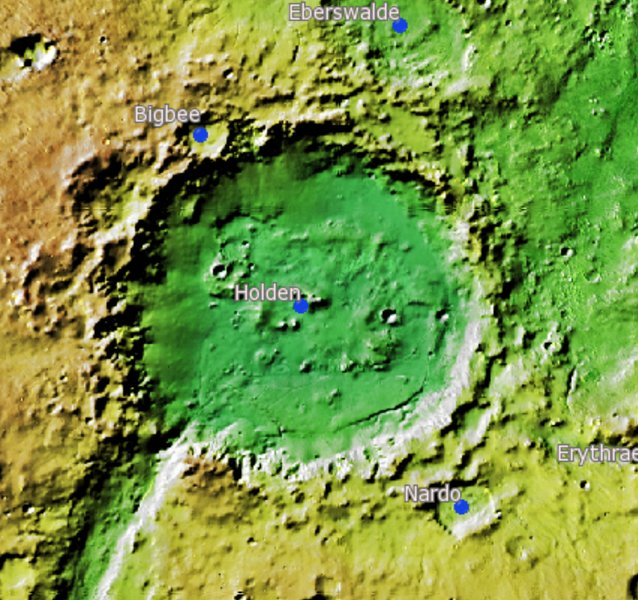 Cráter marciano Holden. (Imagen IAU/USGS/Goddard/A SU/USGS)